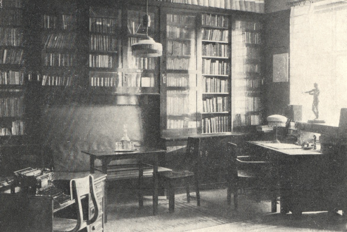 Raittiuden Ystävien sihteerin huone.